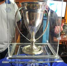 Primeira taça conquistada pelo São Bento